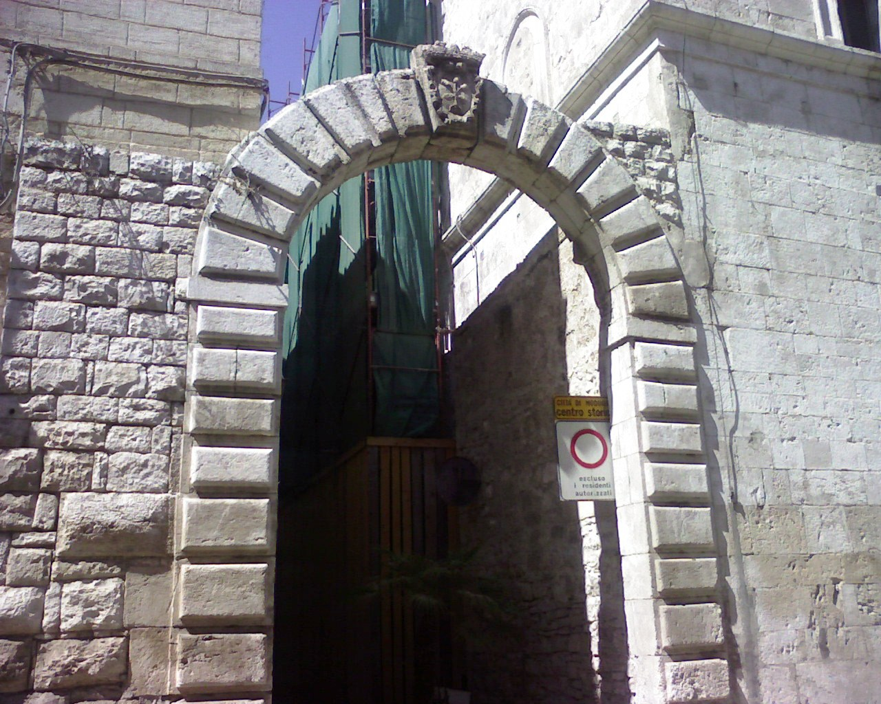 porta del suburbio - Modugno (bari)-Italy